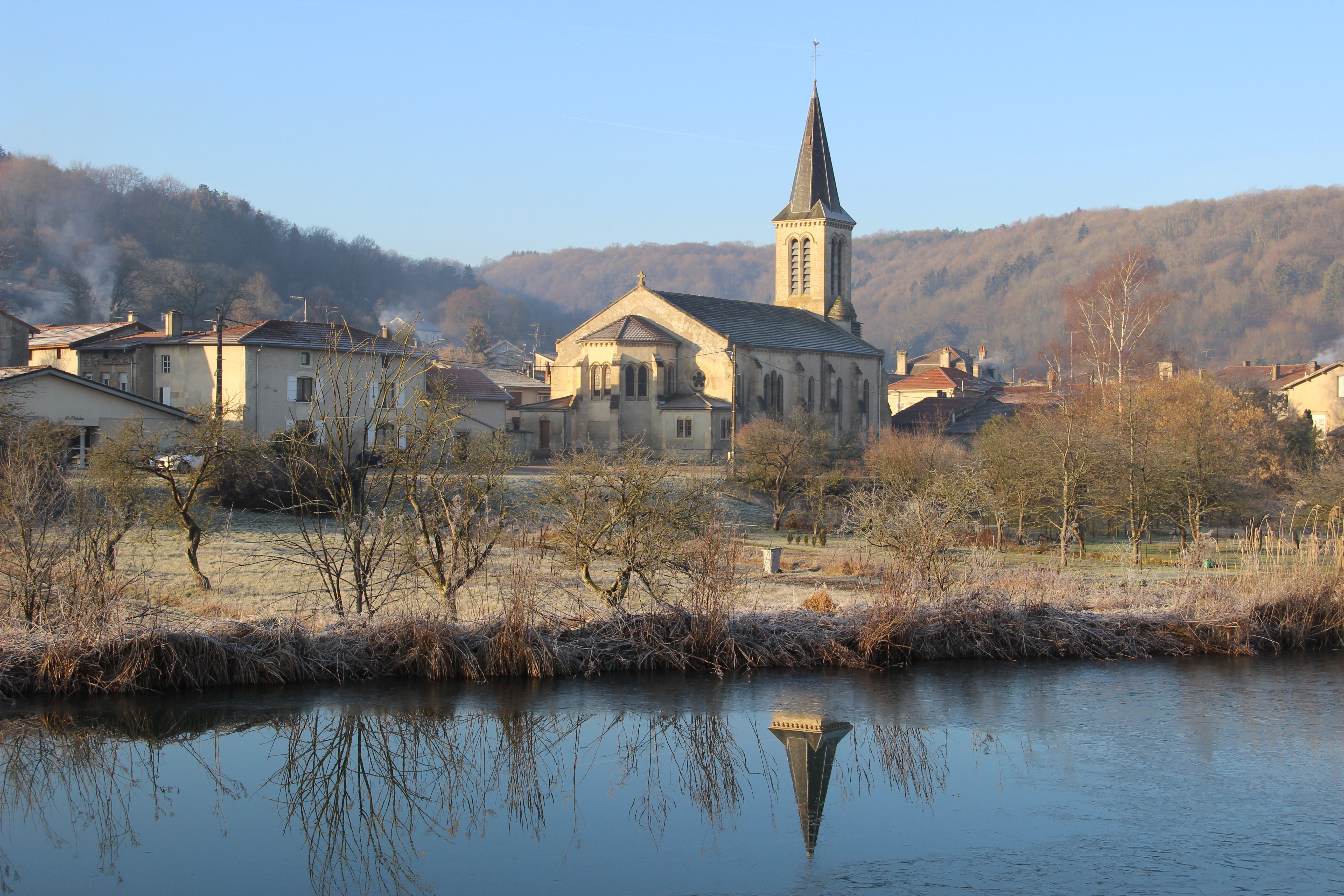 Aperçu du village depuis le canal en hiver.